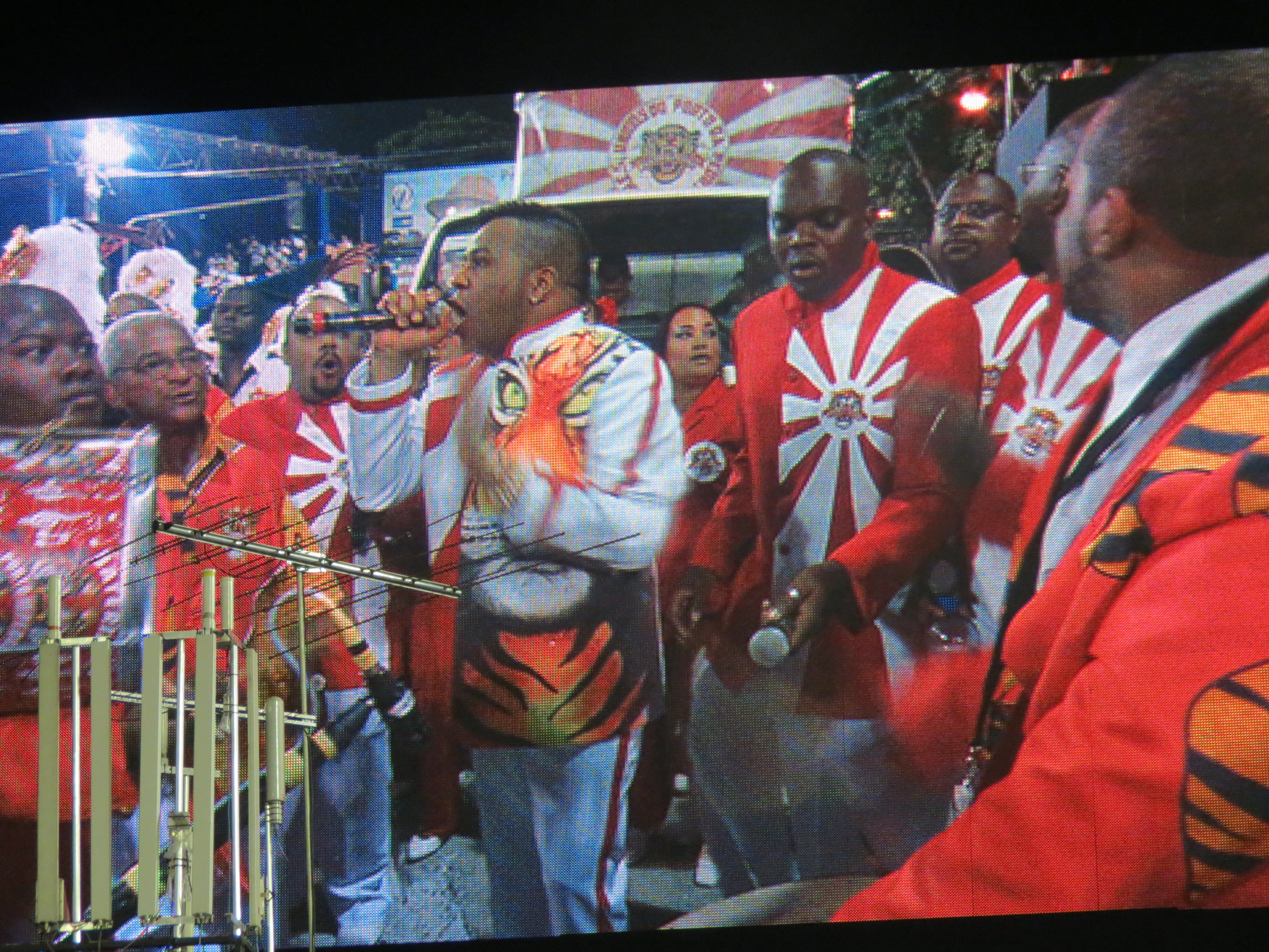 Porto da Pedra - Special Samba School Parade - Rio Carnaval 2012 22